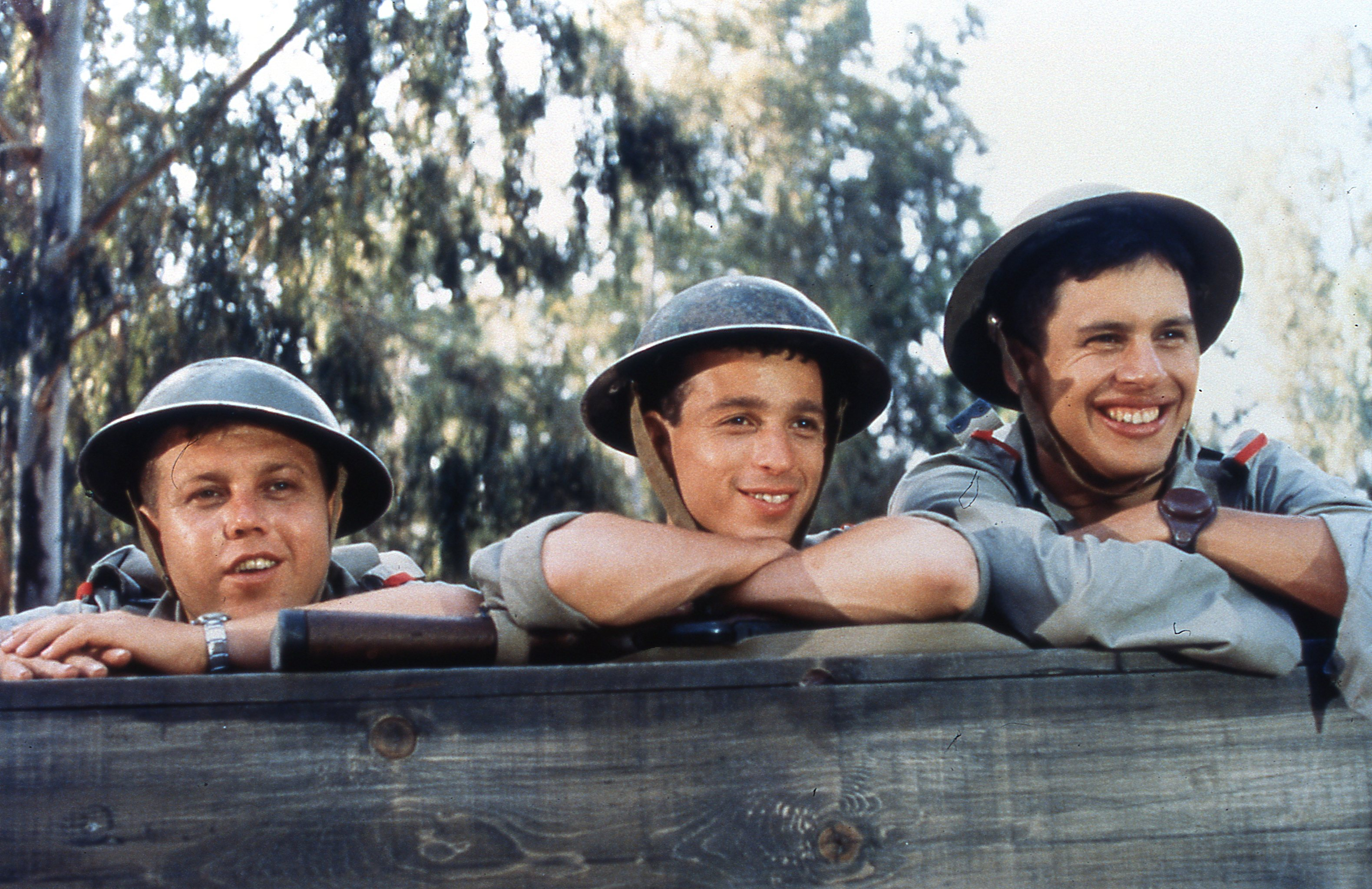 אסקימו לימון